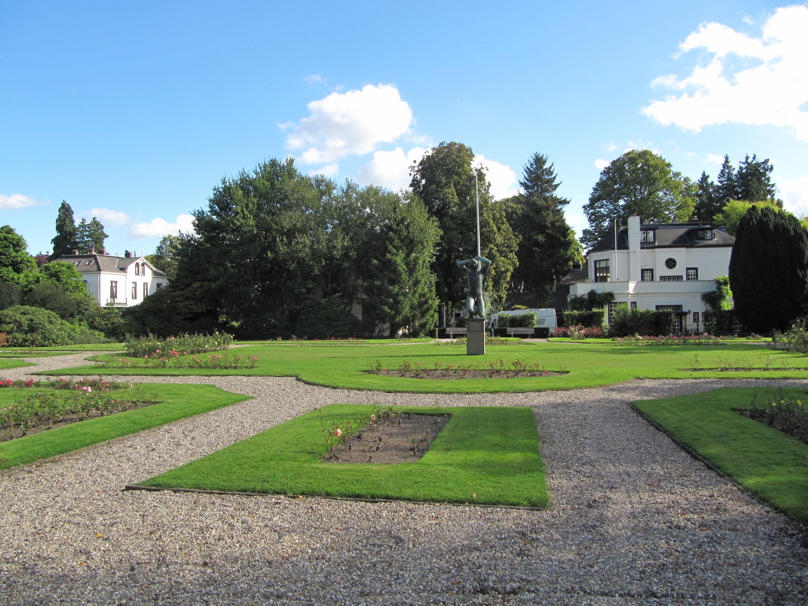 RM522811 Hilversum - Torenlaan 42 (foto 1).jpg